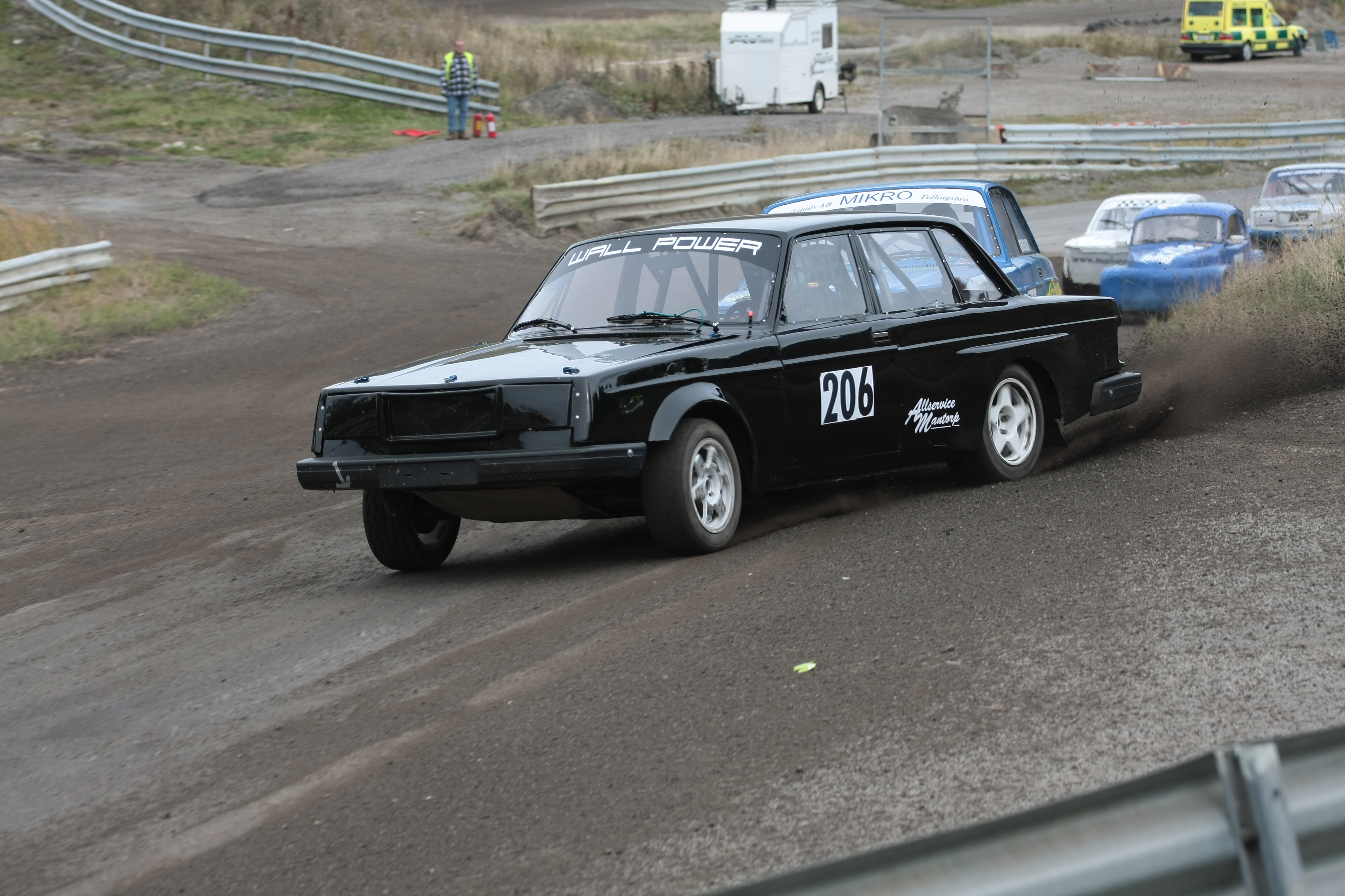 Daniel Wall - alltid en satans fart i sina bilar och han vet ju dessutom hur man använder ratt och pedaler för att rikta bilen dit han vill...